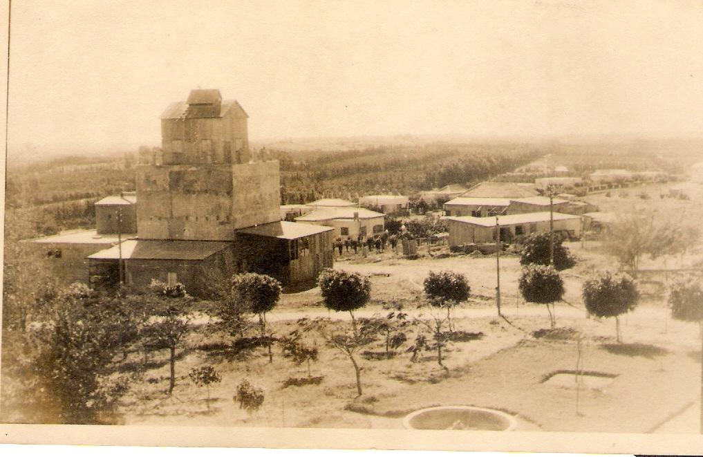 בית חרות בתחילת שנות ה-40 השבית המסומן הוא רחוב הראשונים